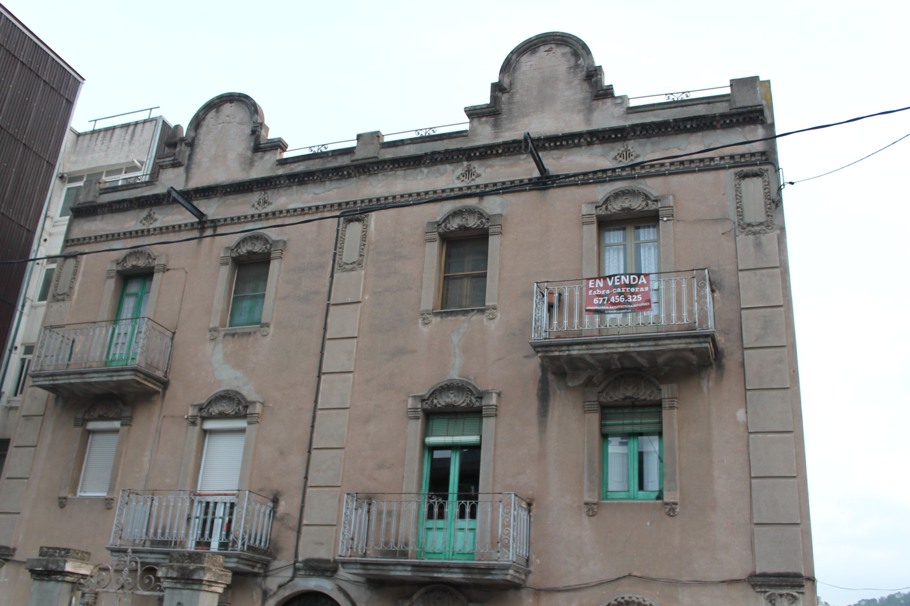 Habitatge a l'avinguda Catalunya, 6 (Cervelló)